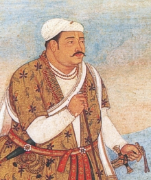 Udai Singh of Marwar